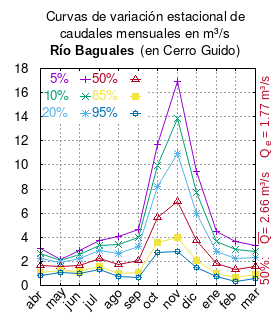 Curvas de variación estacional del río Baguales en Cerro Guido, aguas arriba de la junta con río Vizcachas. # Dirección General de Aguas # Diagnóstico y clasificación de los cursos y cuerpos de agua según objetivos de calidad. Cuenca del río Serrano. # Santiago de Chile # Ministerio de Obras Públicas (Chile) # 2004 # url: # urlarchivo: # Tabla 4.2: Río Baguales en cerro Guido (m3/s), pág. 25 mes 5% 10% 20% 50% 85% 95% abr 3.040 2.654 2.253 1.646 1.107 0.862 may 2.183 2.036 1.867 1.572 1.256 1.092 jun 2.911 2.576 2.221 1.673 1.181 0.962 jul 3.739 3.330 2.894 2.214 1.591 1.310 ago 4.072 3.377 2.693 1.746 1.024 0.749 sep 4.666 3.951 3.207 2.082 1.083 0.630 oct 11.731 9.981 8.207 5.646 3.561 2.717 nov 16.899 13.887 10.948 6.950 3.971 2.858 dic 9.428 7.691 6.007 3.737 2.069 1.454 ene 4.443 3.633 2.846 1.785 1.005 0.717 feb 3.671 2.963 2.271 1.330 0.628 0.366 mar 3.346 2.859 2.351 1.584 0.902 0.593 This plot was created with Gnuplot.